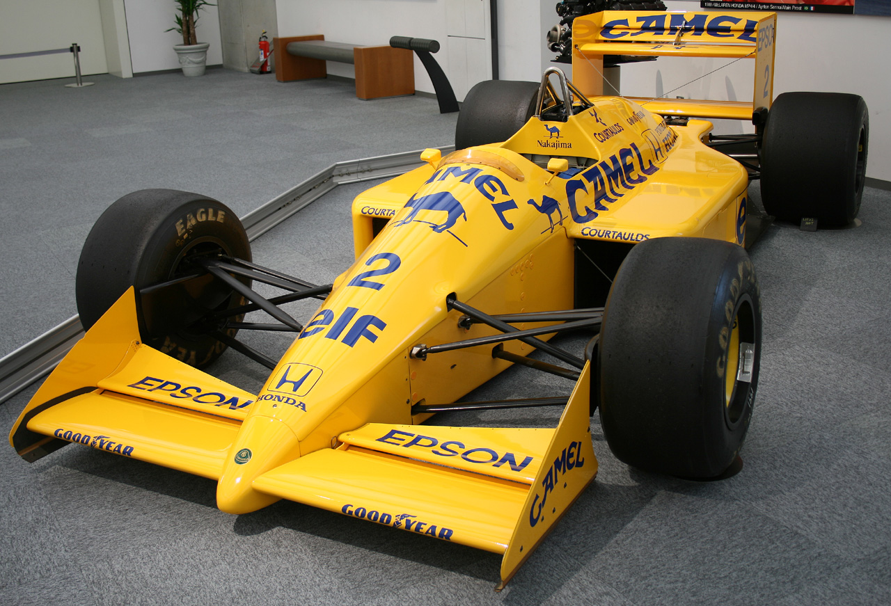 The Lotus 100T (#2 Satoru Nakajima)